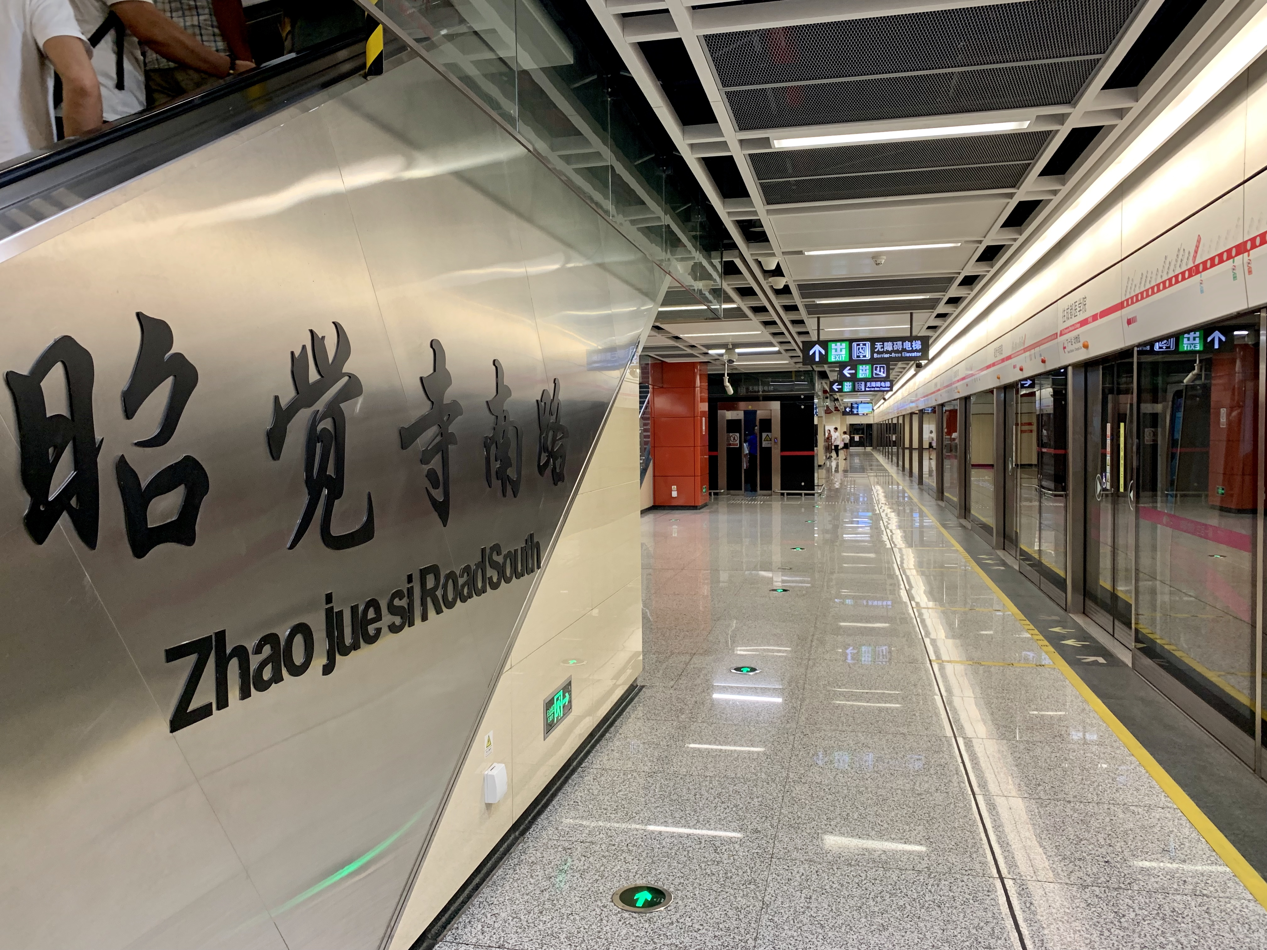 成都地铁昭觉寺南路站